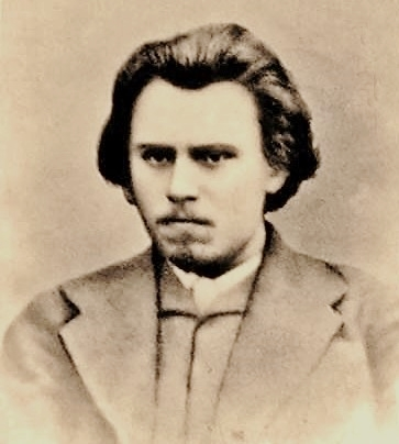 Andrej Ivanovič Željabov